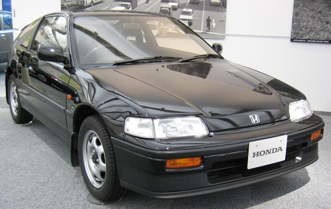 Honda CR-X 1987 model